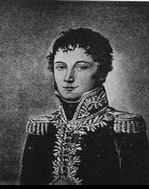 Général_Jean_Pierre_Baillod.png